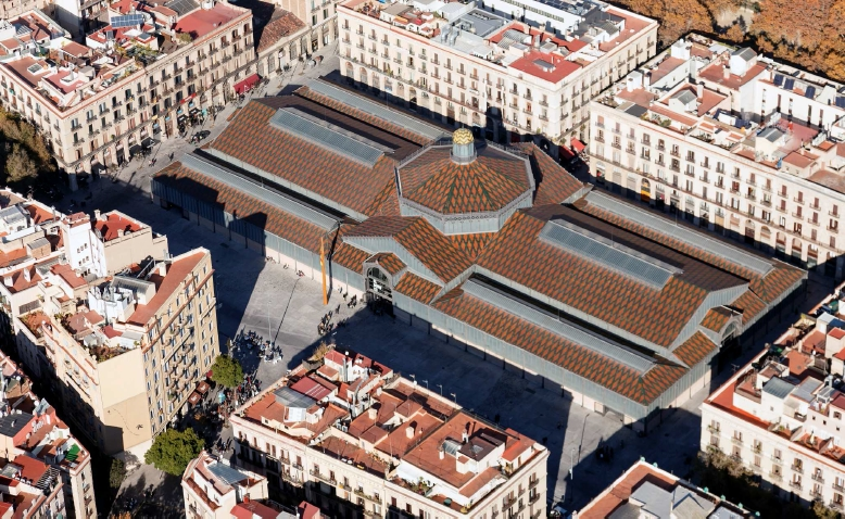 Vista aèria del Mercat del Born